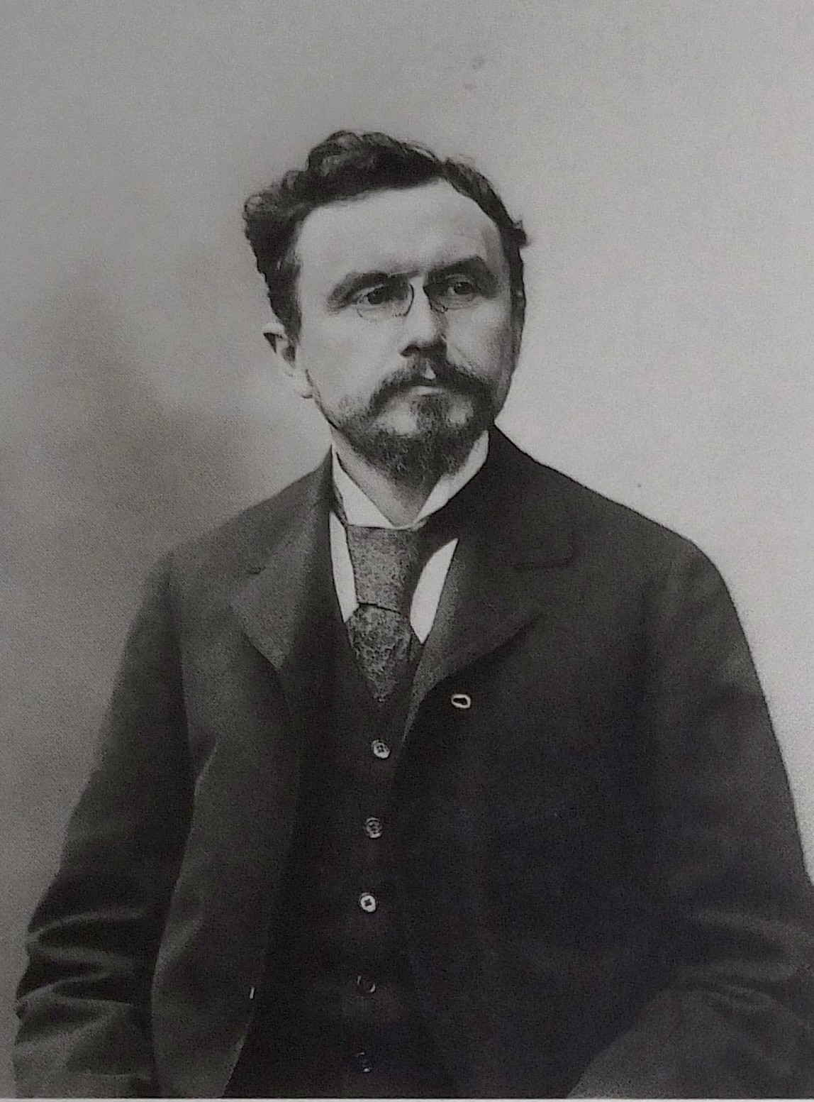 Gabriel Hanotaux, photographié le 28 avril 1898 par Paul Nadar.